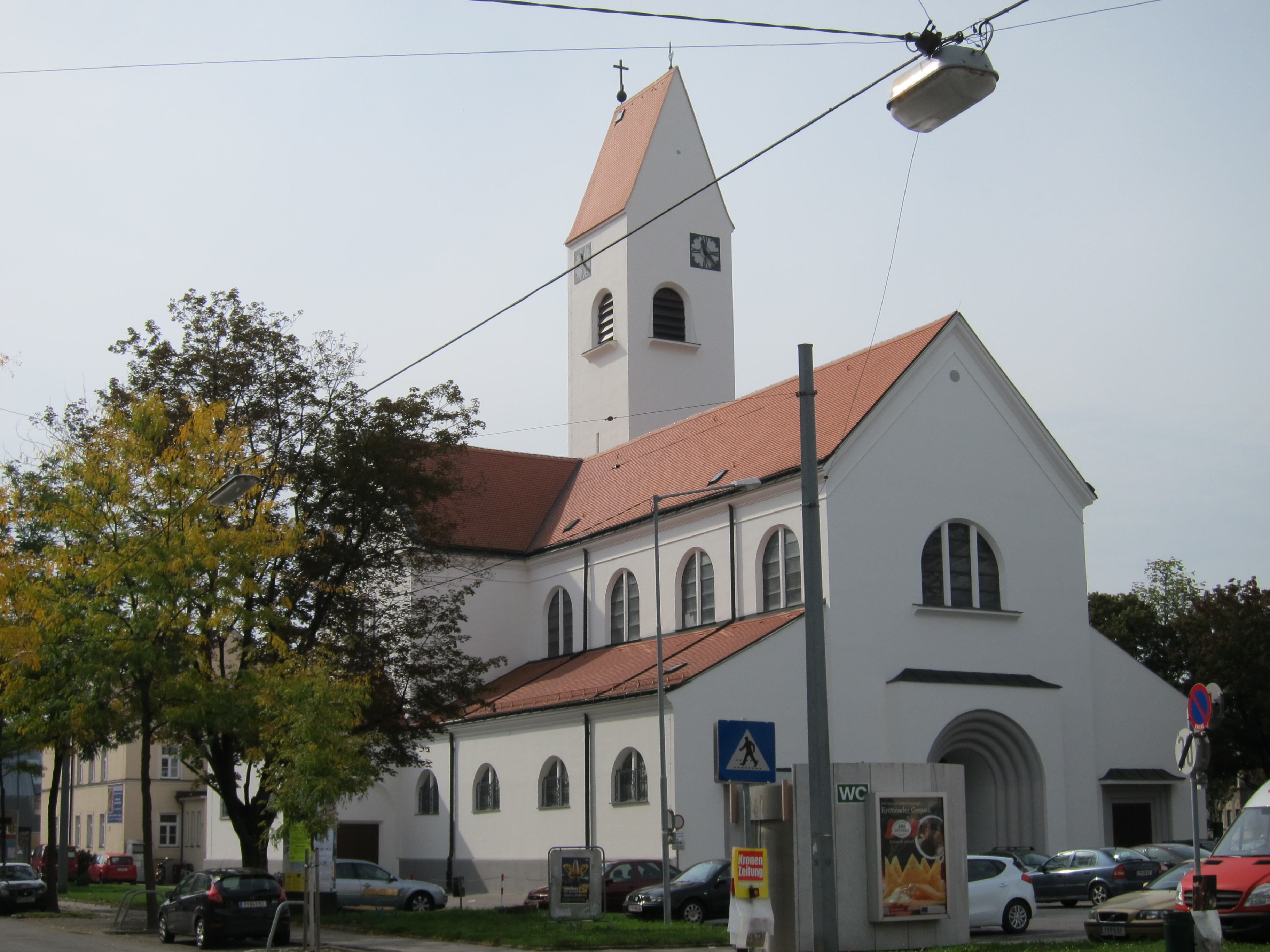 Kath. Pfarrkirche hl. Josef